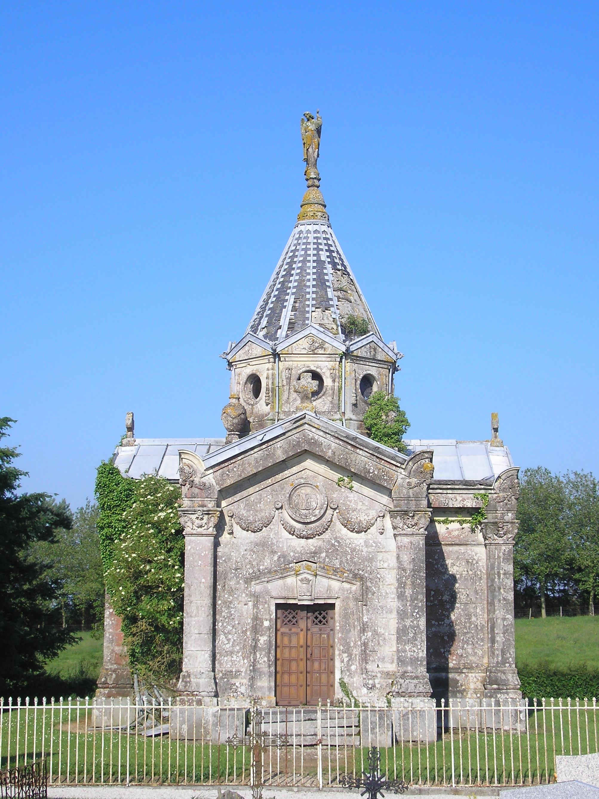 Dampierre (Normandie, France). La chapelle funéraire.